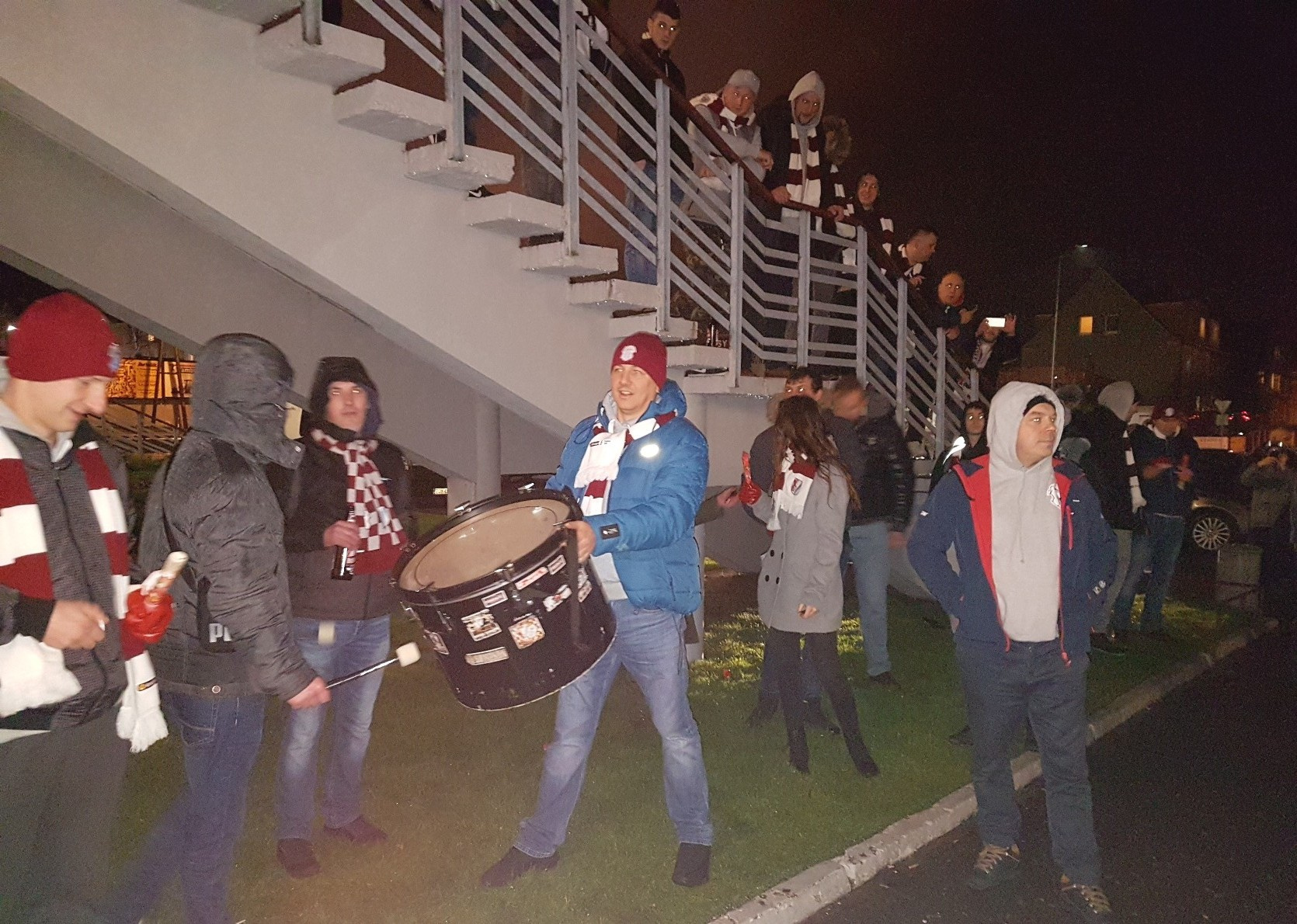 Kibice Spójni w podziekowaniu za wygraną z GTK Gliwice (23.12.2018)